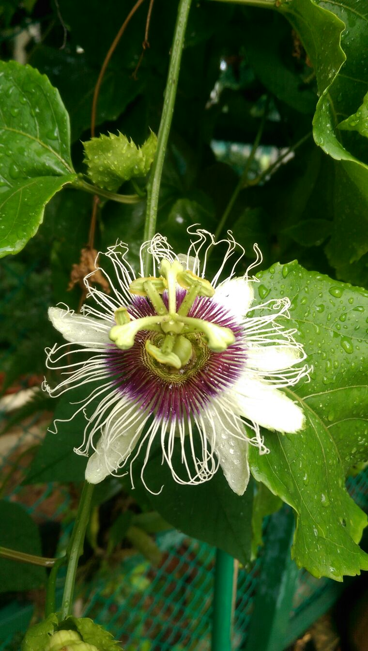 Singapura Pokok Markisa